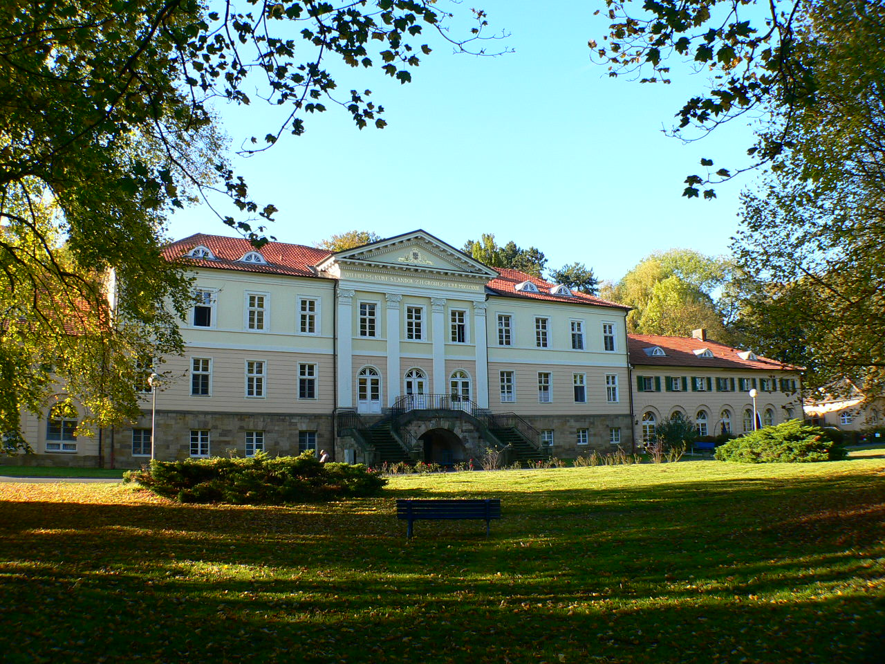 Schloss Beberbeck, Gartenfront, in Hofgeismar-Beberbeck im Landkreis Kassel, Hessen, Deutschland